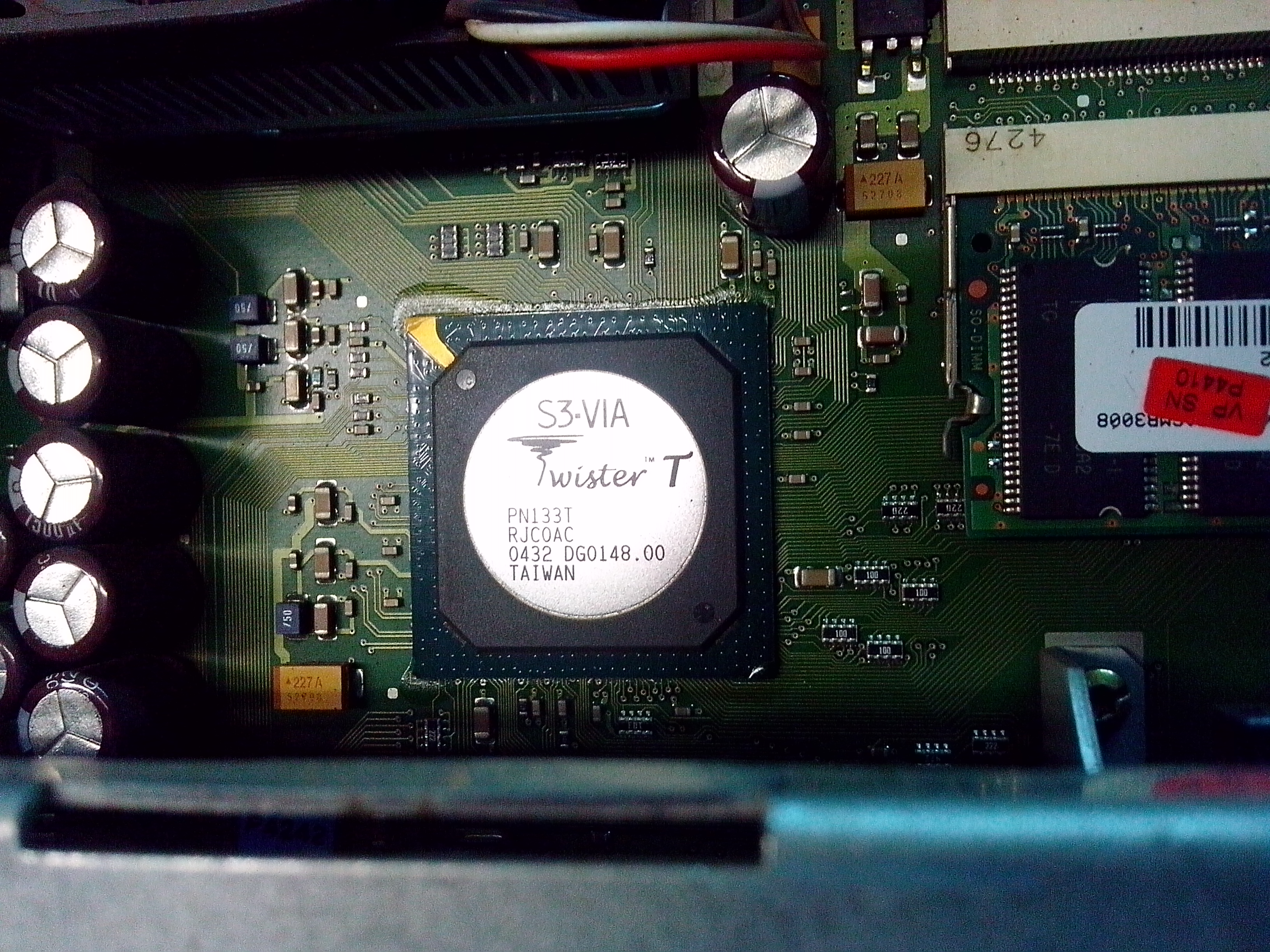 Интегрированная графика с материки промышленного компьютера SIEMENS